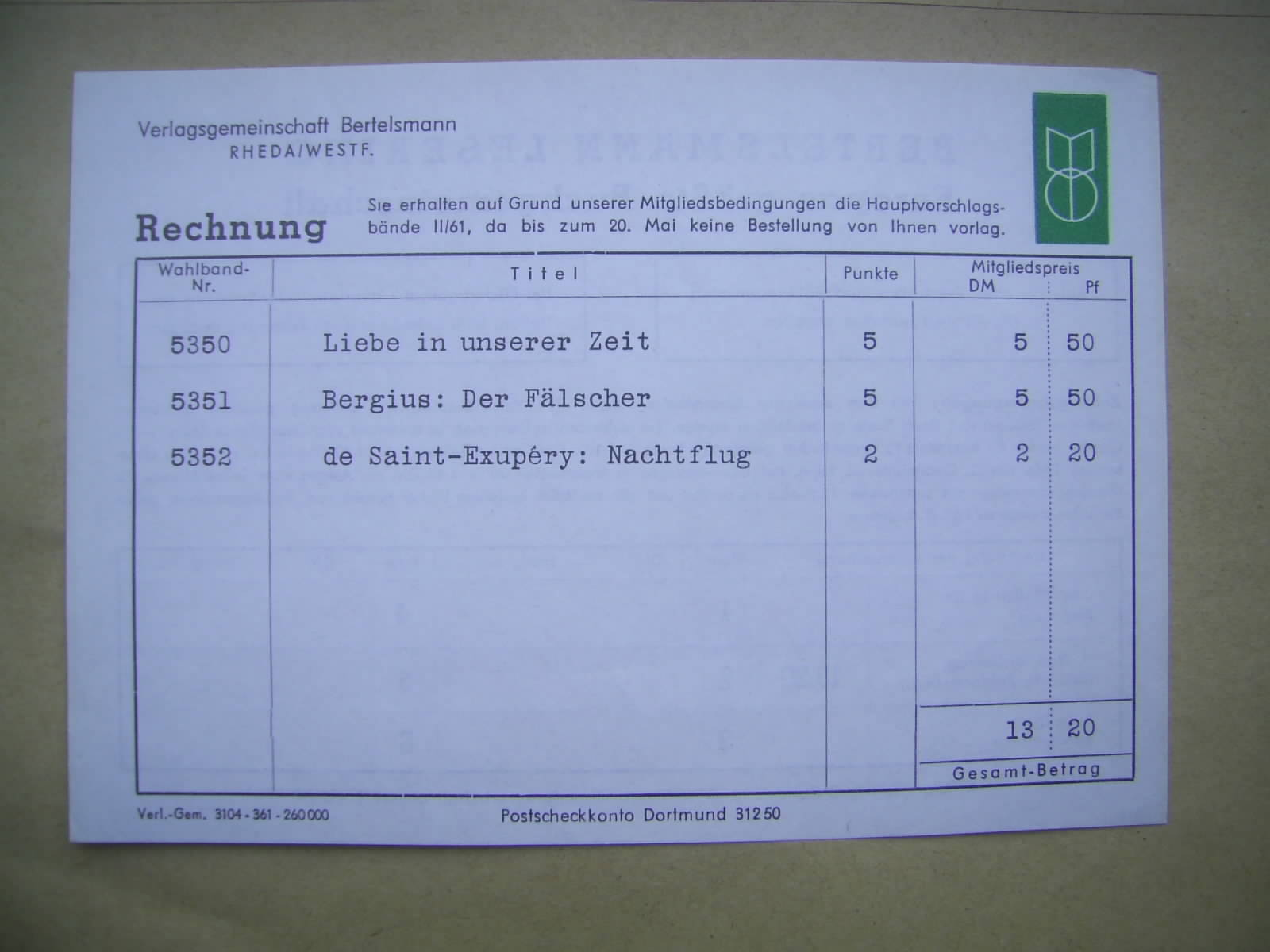 Rechnung des Bertelsmann Leserings 2. Quartal 1961, Vorderseite. Ausgeliefert wurden die Bücher "Liebe in unserer Zeit", "Bergius: Der Fälscher", "Antoine de Saint-Exupéry: Nachtflug".